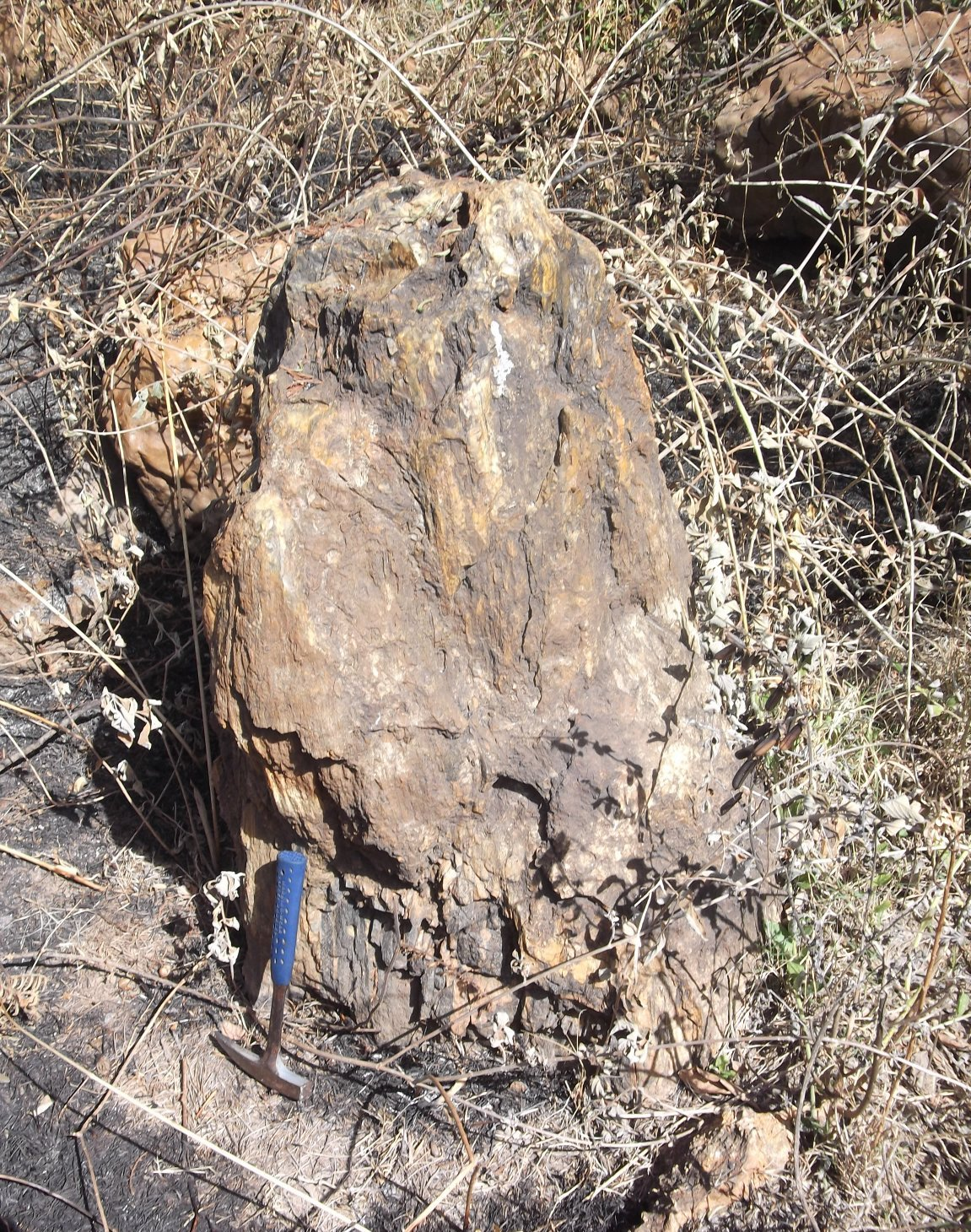 Tronco de gimnosperma em posição de vida, Floresta Fóssil do Rio Poti, em Teresina.